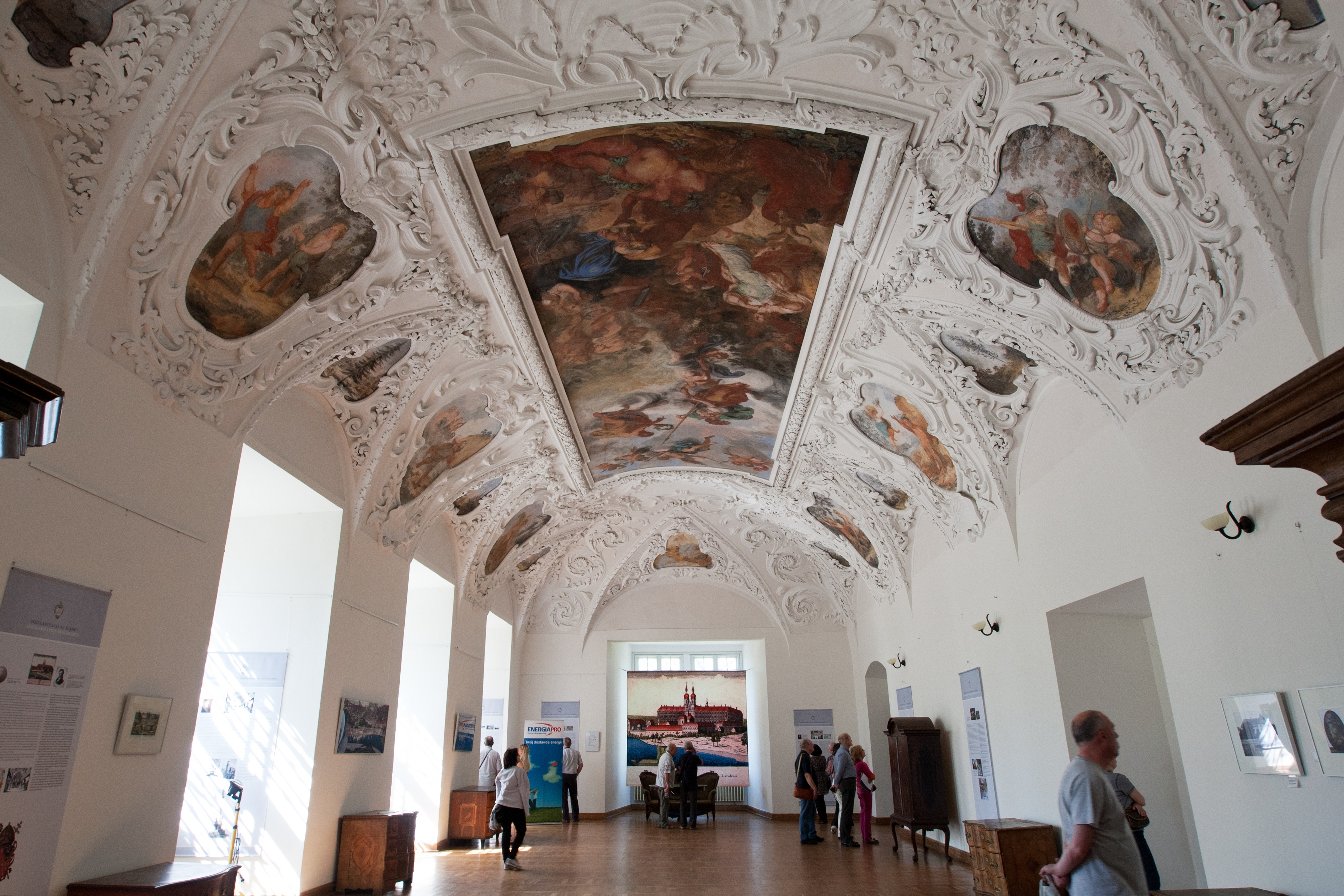 Opactwo cystersów w Lubiążu - letni refektarz